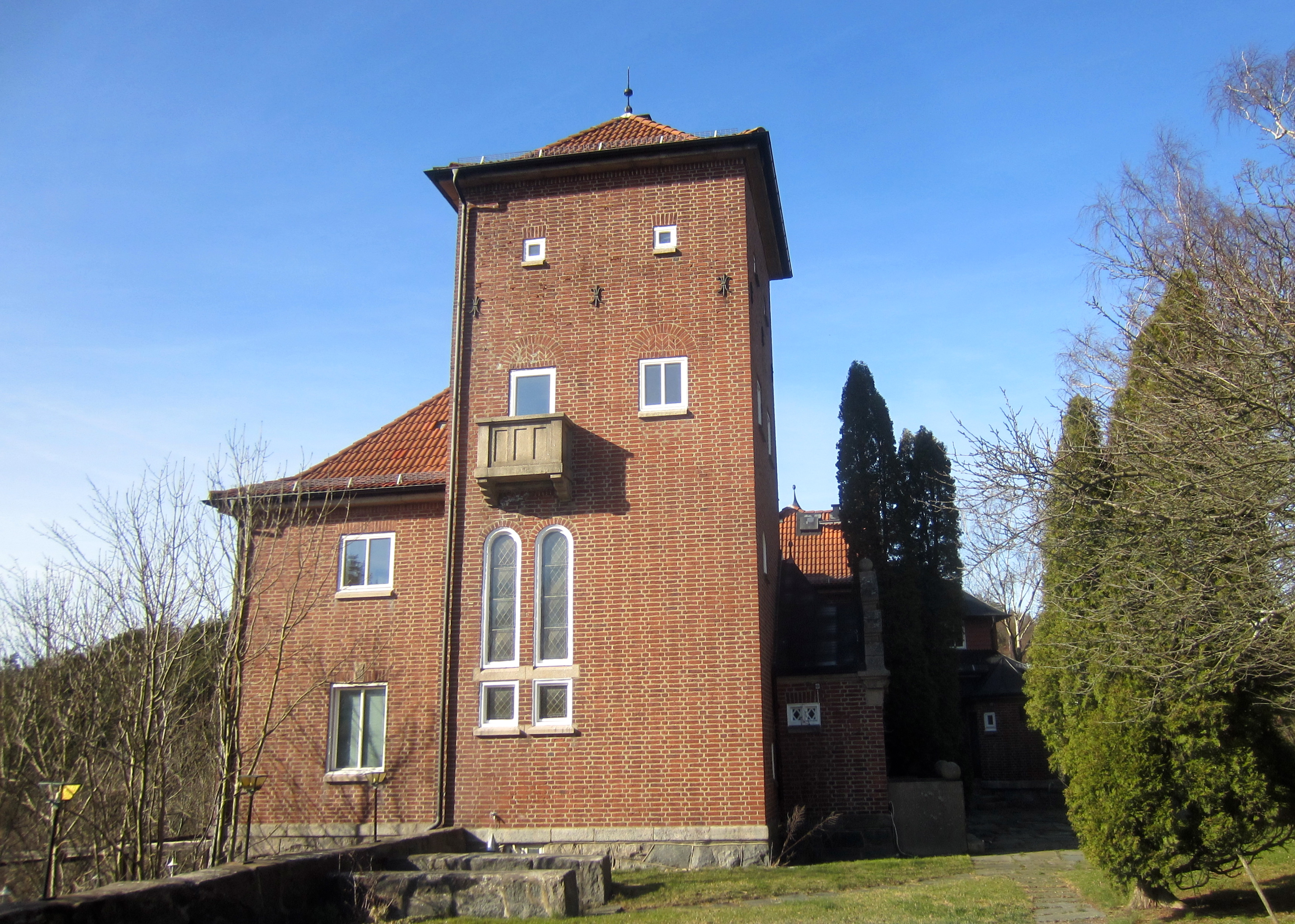 Villa Porthälla i Partille kommun byggdes 1914-18 för direktör Ernst Harbeck och hans familj. Villan ritades av arkitekt Hjalmar Zetterström.